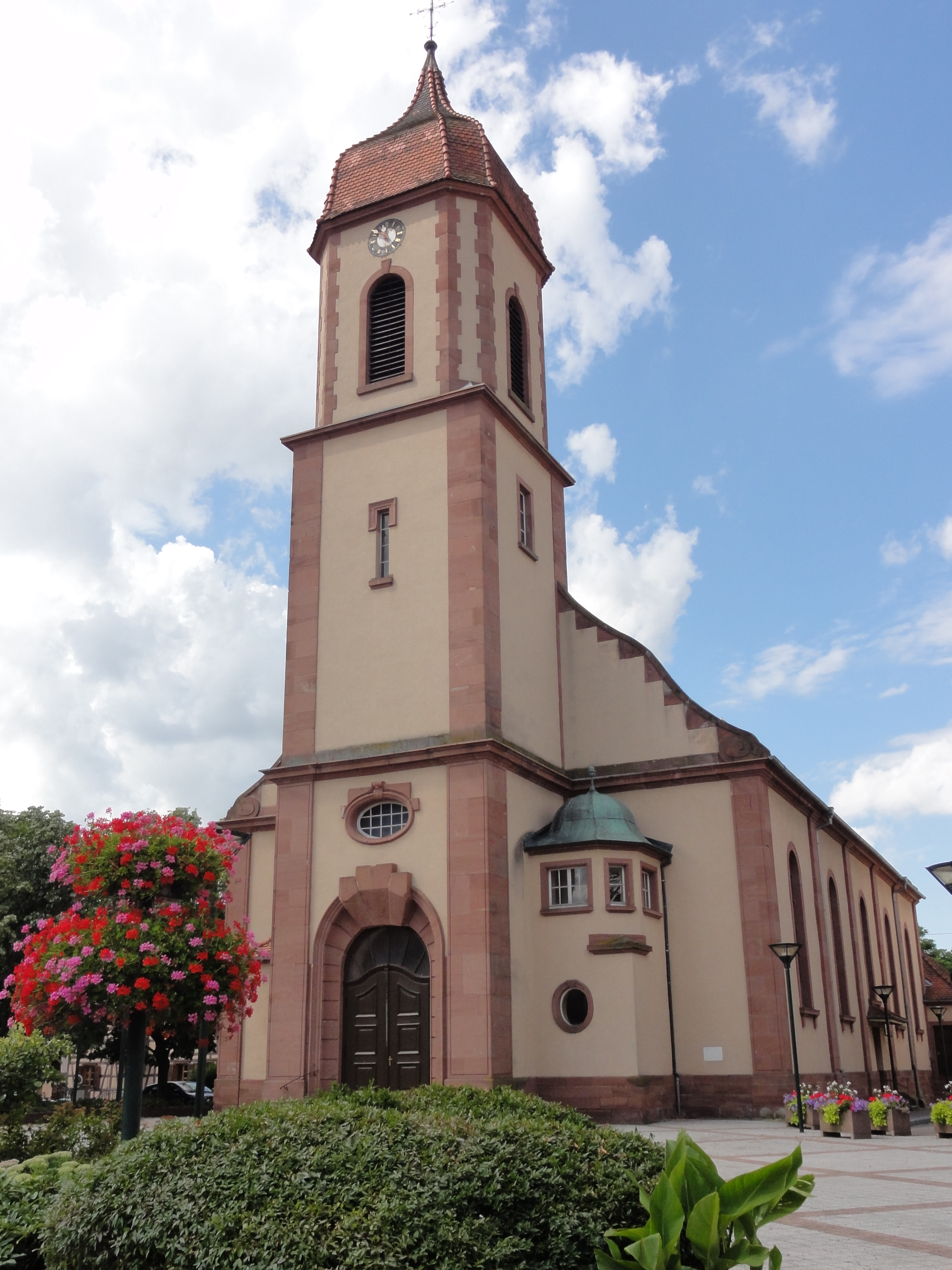 Alsace, Bas-Rhin, Église Saint-Barthélemy de Durrenbach (IA67007777).